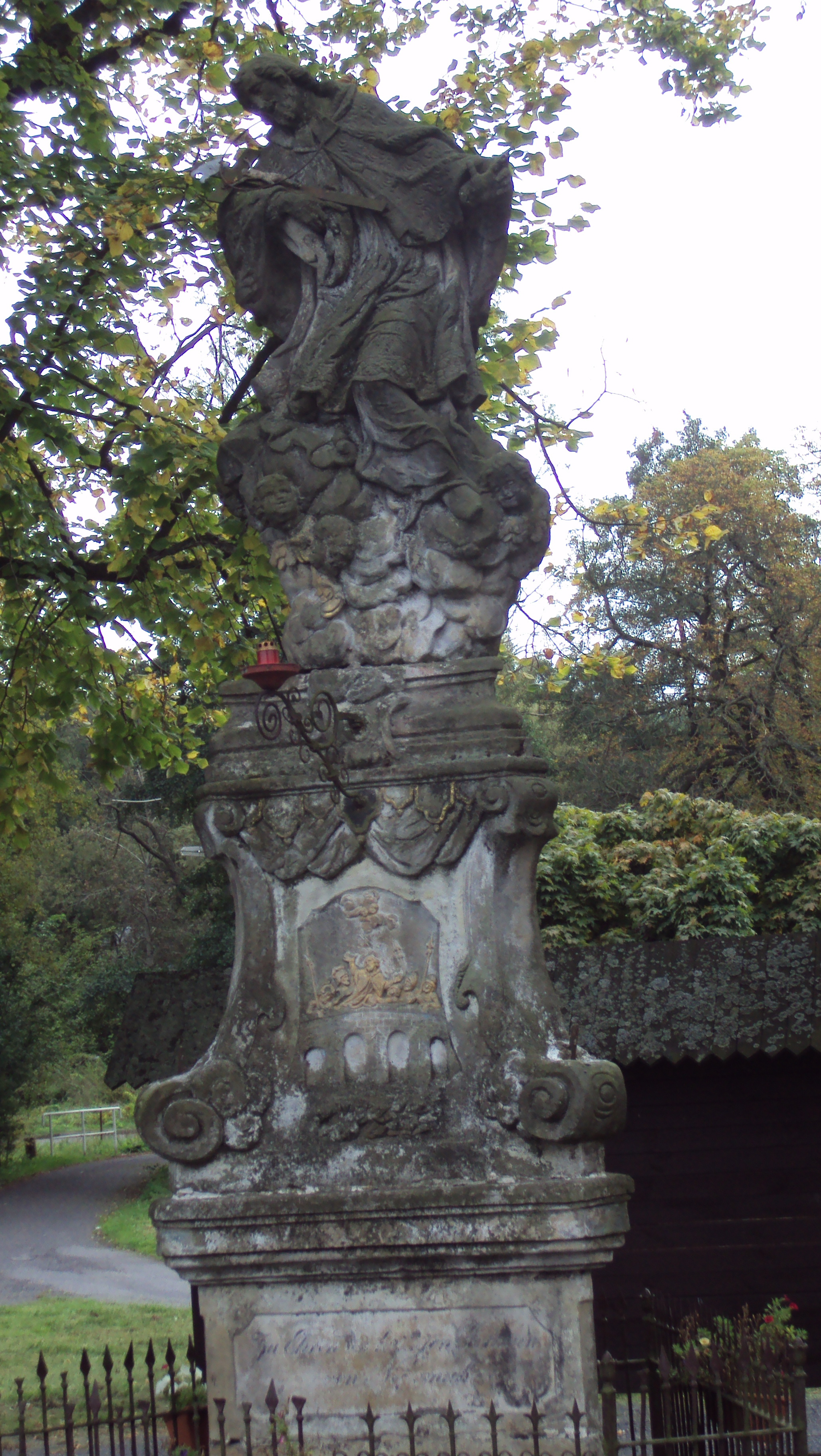 Socha sv. Jana Nepomuckého, Lobendava